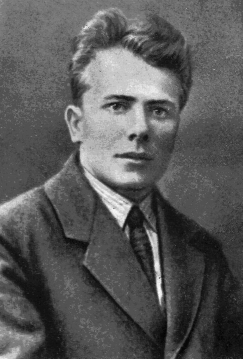 Косинка Григорій Михайлович